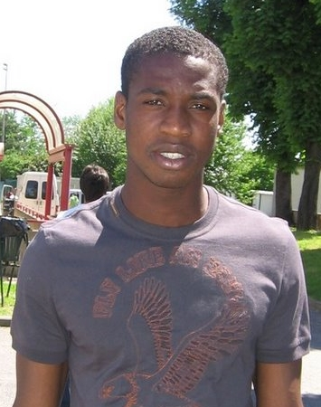 Olivier Kapo